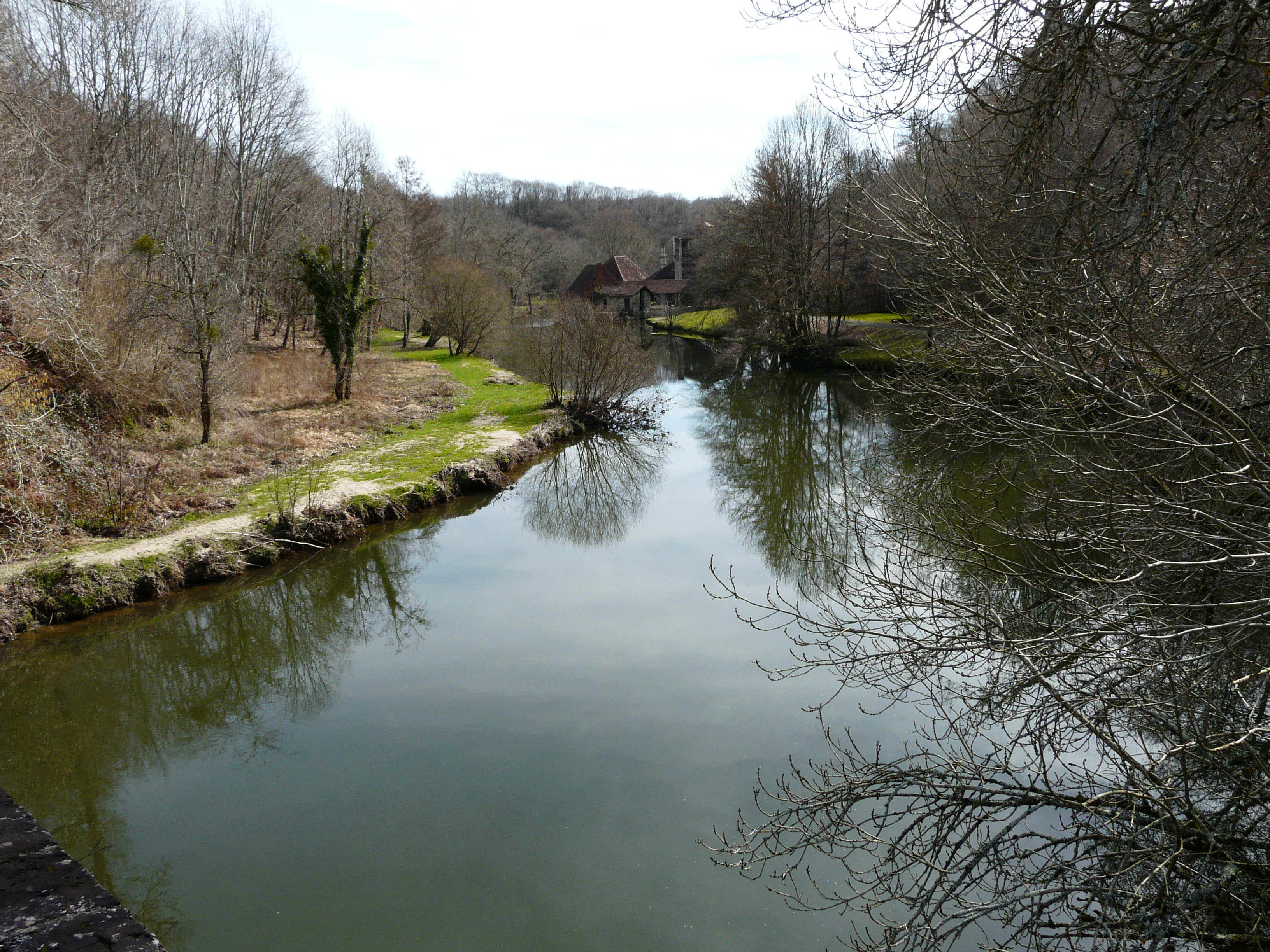 L'Auvézère au site de la Forge, Savignac-Lédrier, Dordogne, France